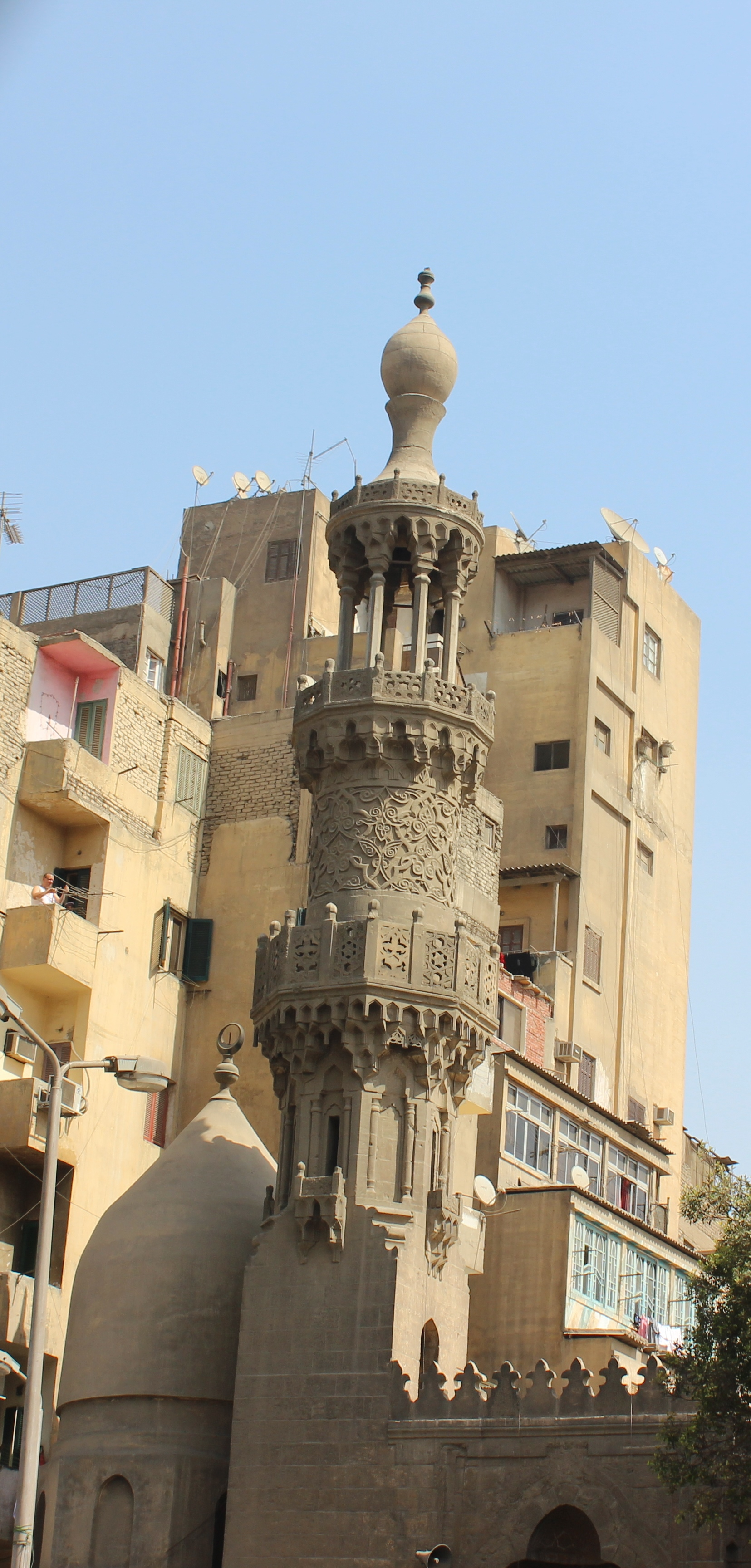 إحدى المئذنات بالقاهرة.